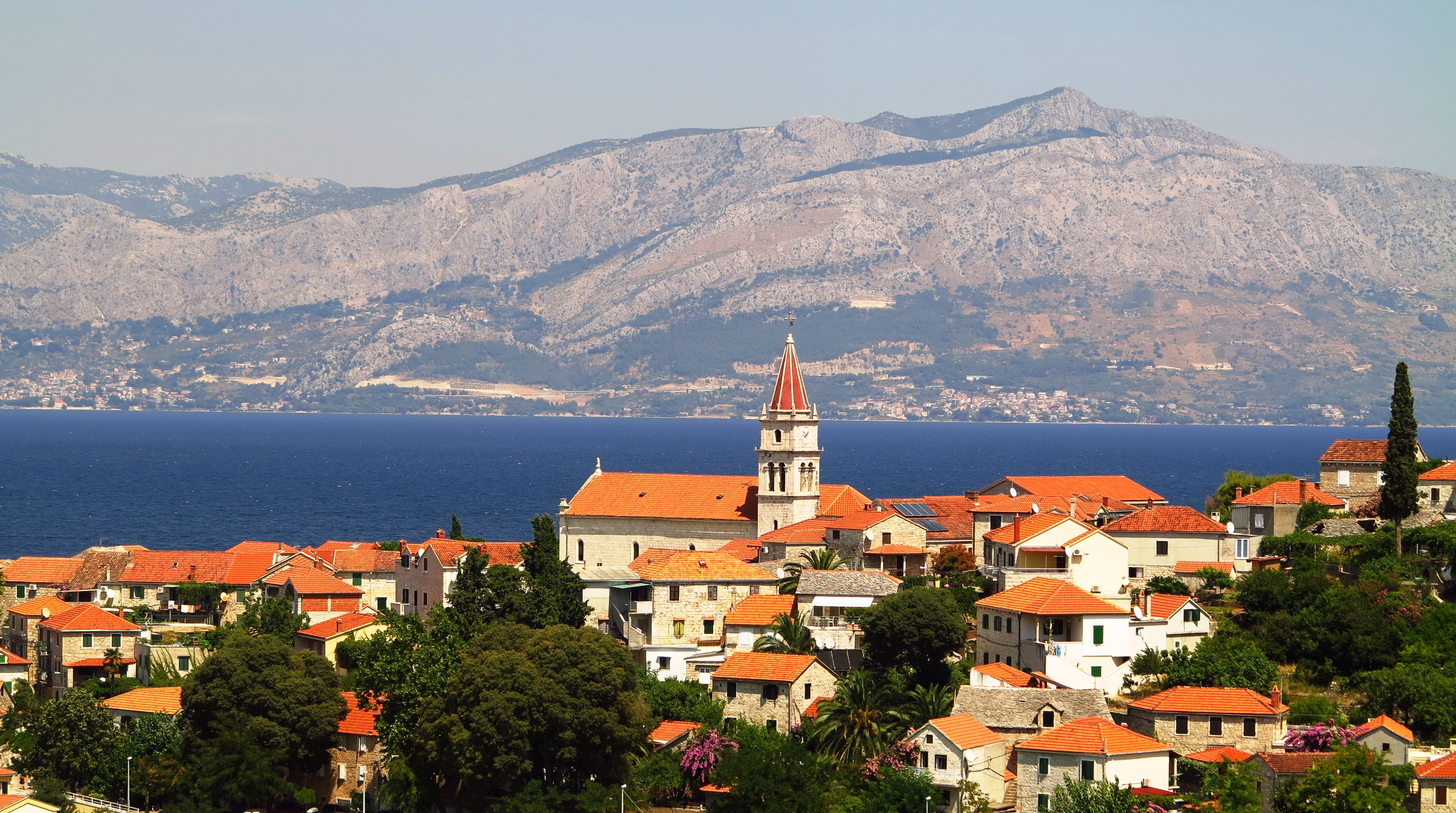 Vue sur le village, la mer et le continent